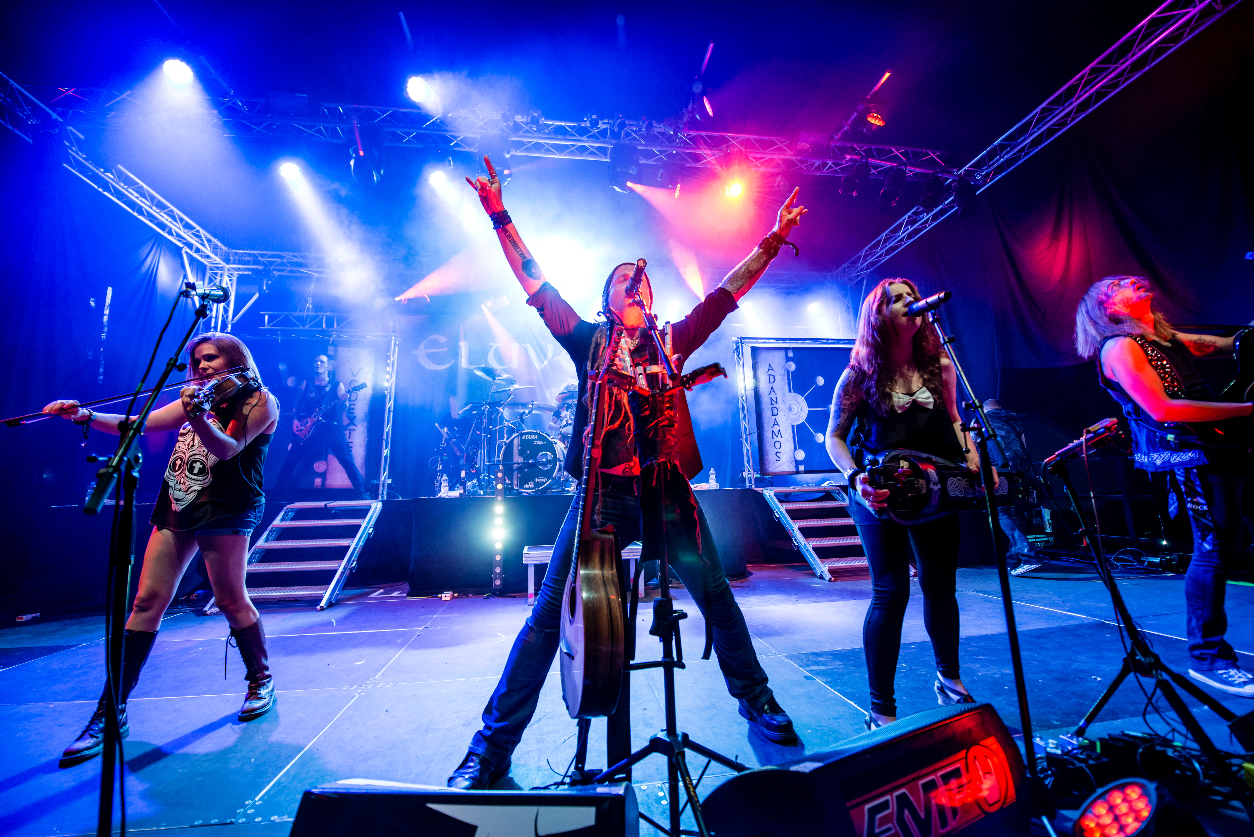 'Dong Open Air 2015; Neukirchen-Vluyn Halde Norddeutschland': 'Eluveitie'